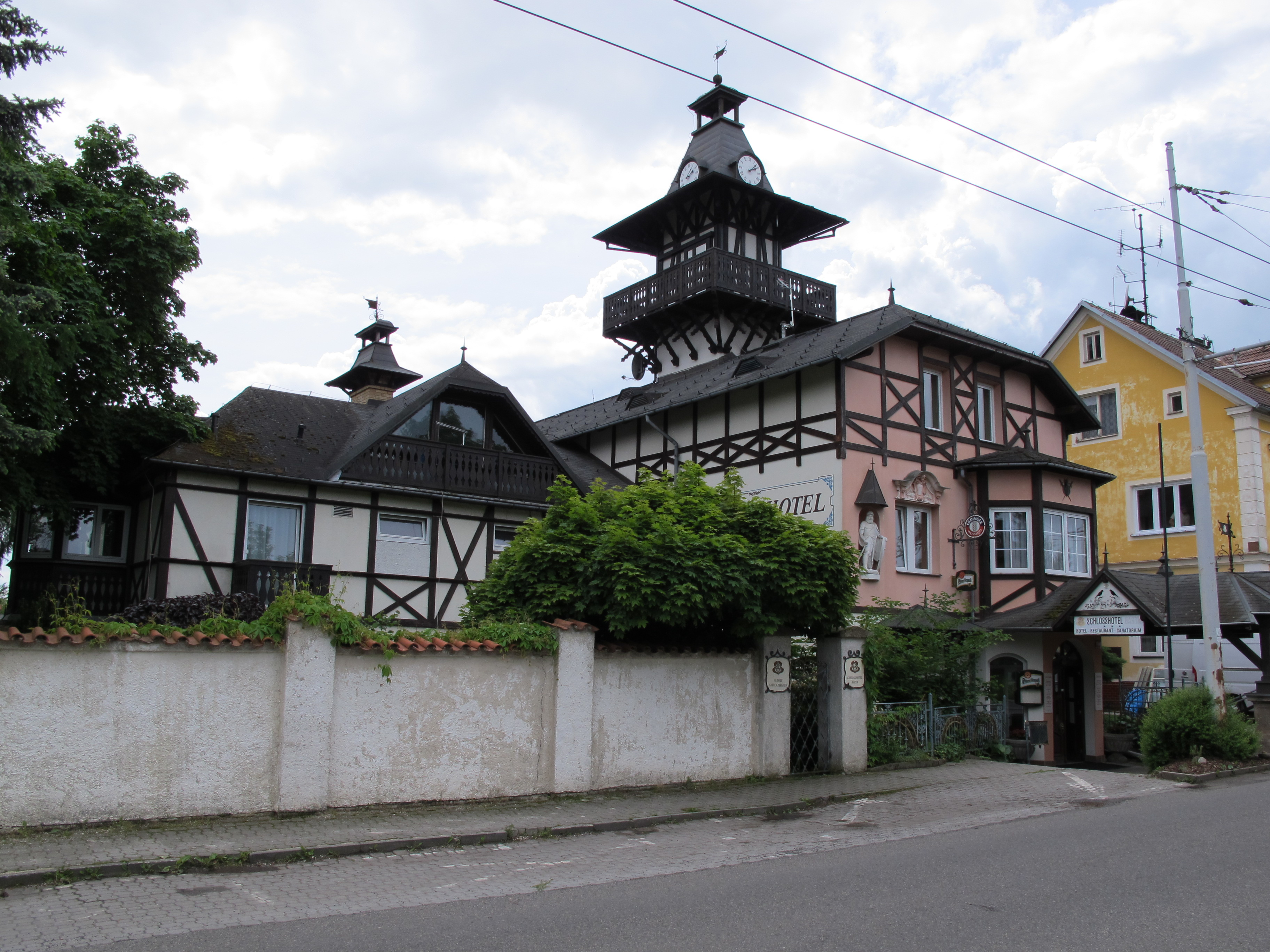 Klimentov, okres Cheb - hotel. This image was acquired during the event Wikiměsto Mariánské Lázně.